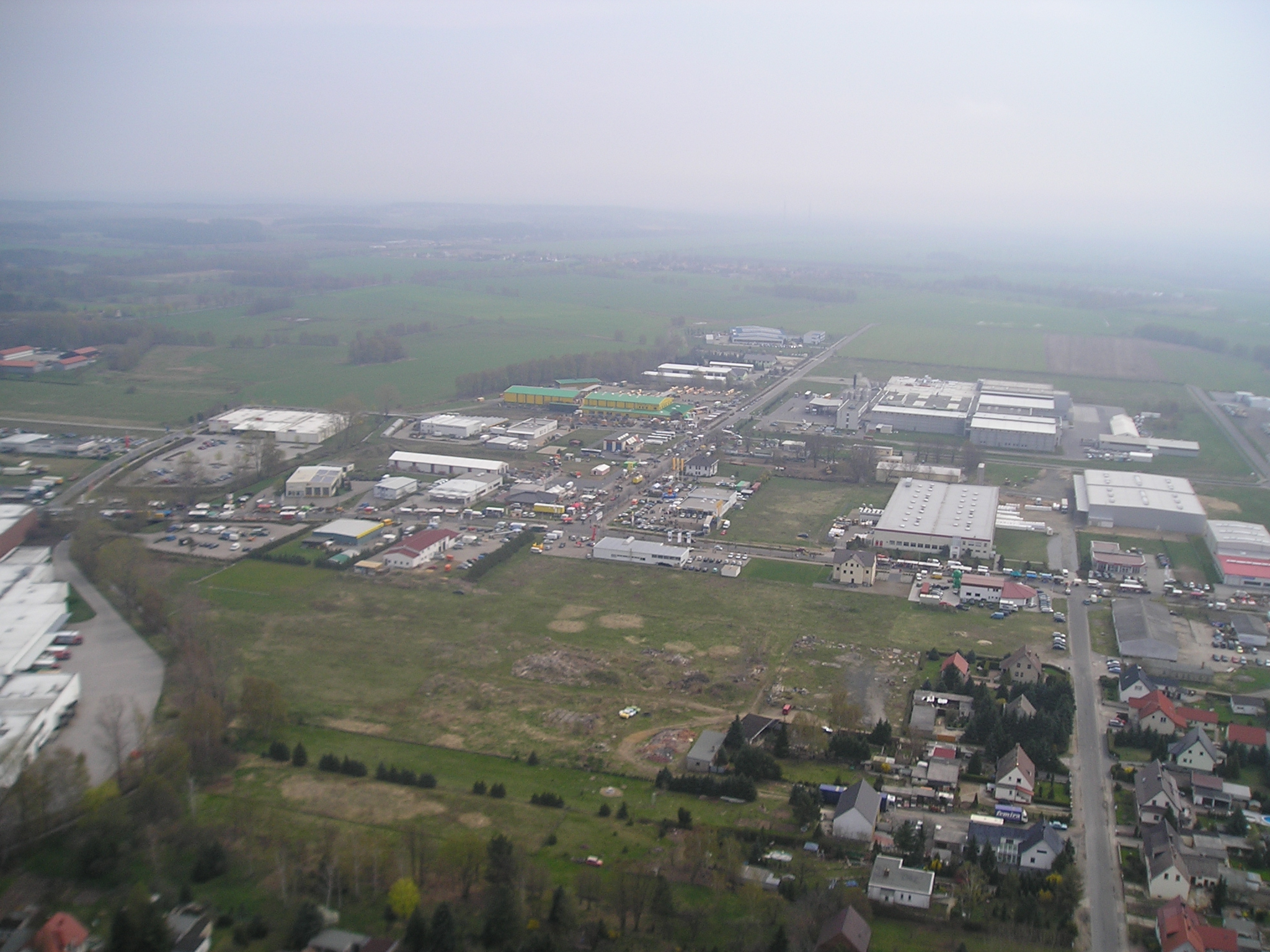 Das Gewerbegebiet Ost in Elsterwerda, Deutschland aus der Vogelperspektive.